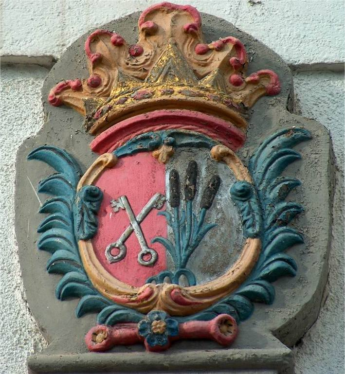 Fotografie großes Wappen Oschersleben